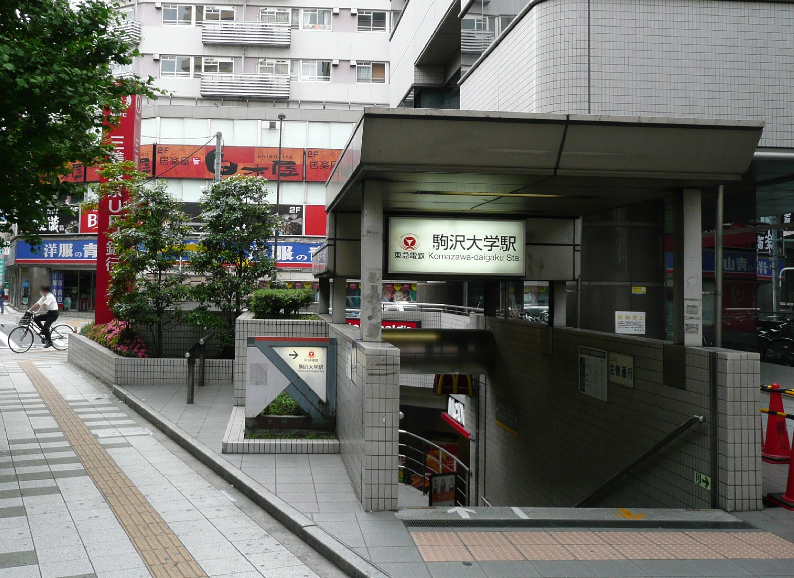 駒沢大学駅駒沢公園口